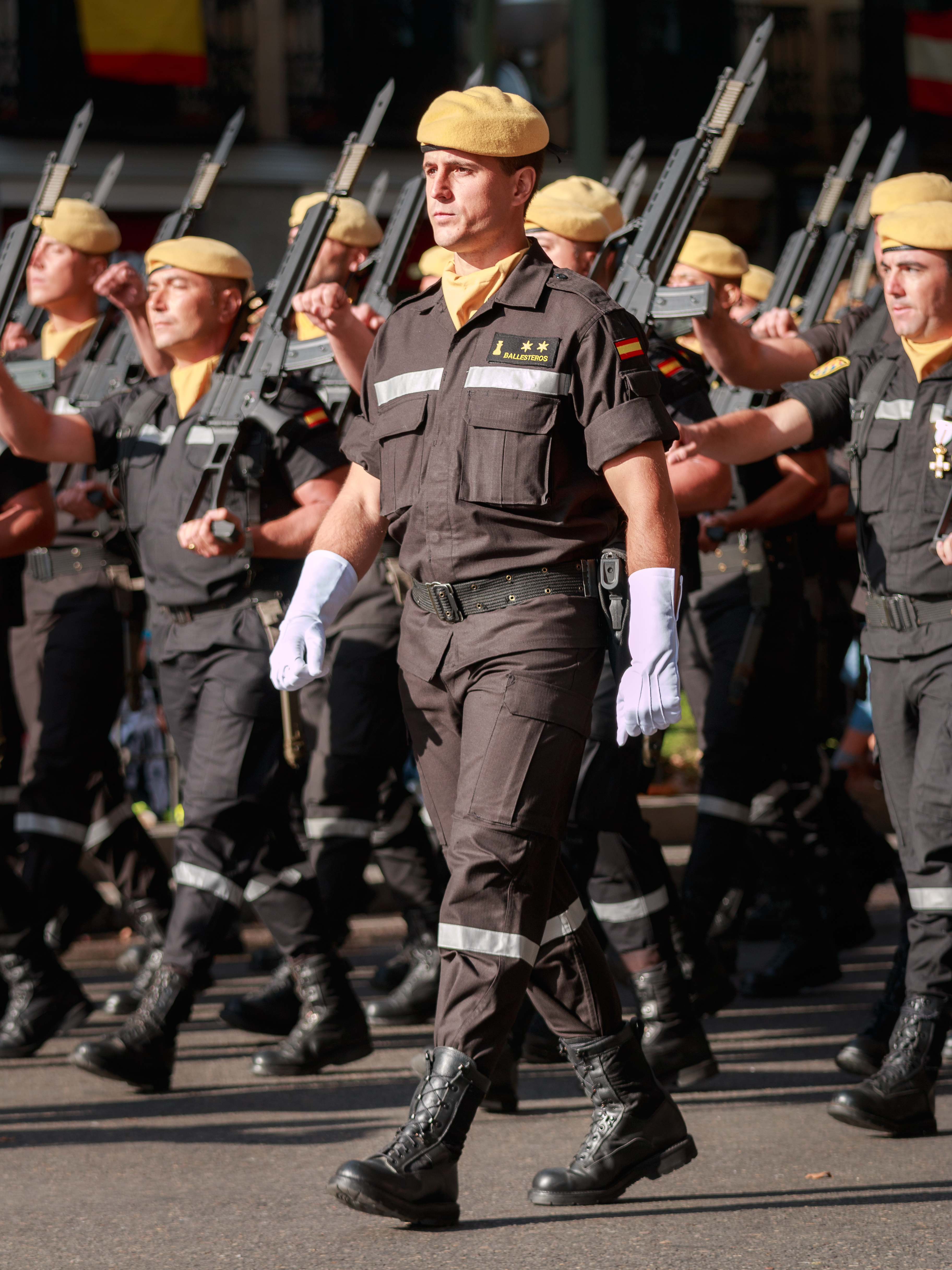 Desfile militar del día de la fiesta nacional, Madrid.